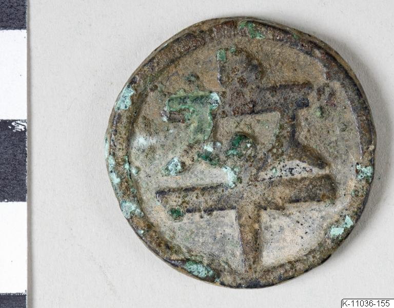 Amulettmynt. Skrift i relief på båda sidorna. K-11036-155 China.